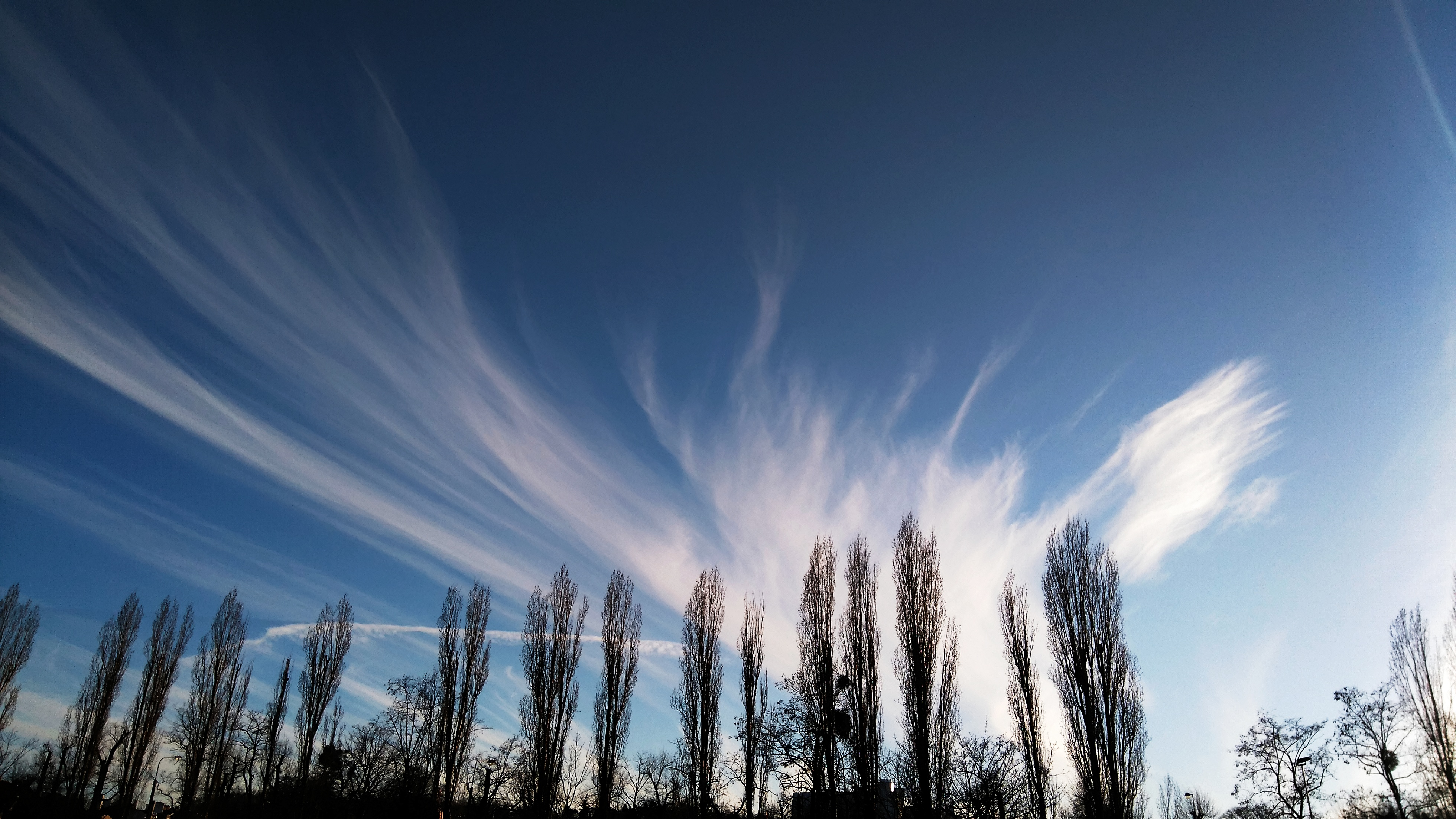 Cirrus fibratus observed over Gdańsk, 2017-03-22